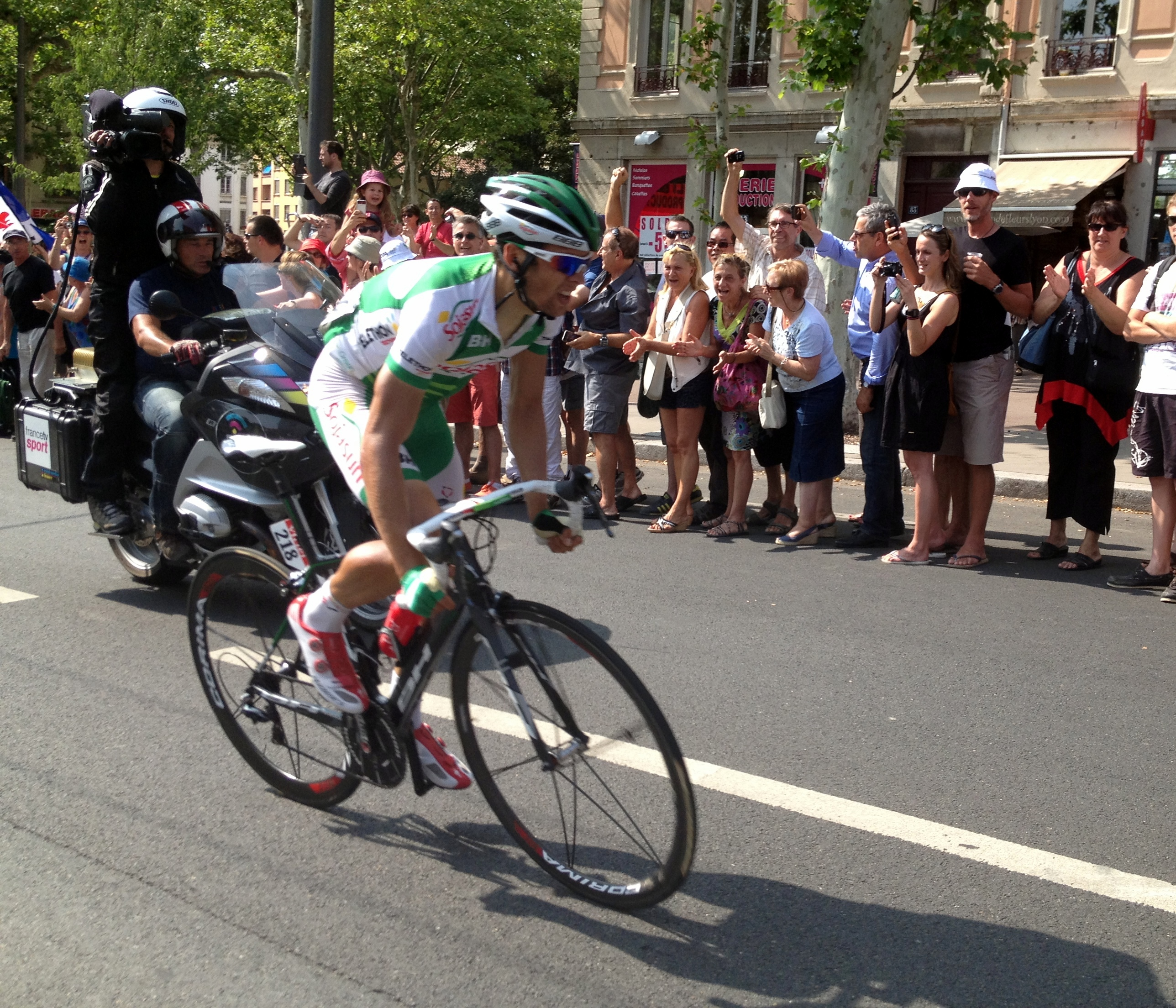 Julien Simon s'apprête à passer en tête la côte de La Croix-Rousse à Lyon (4e catégorie).